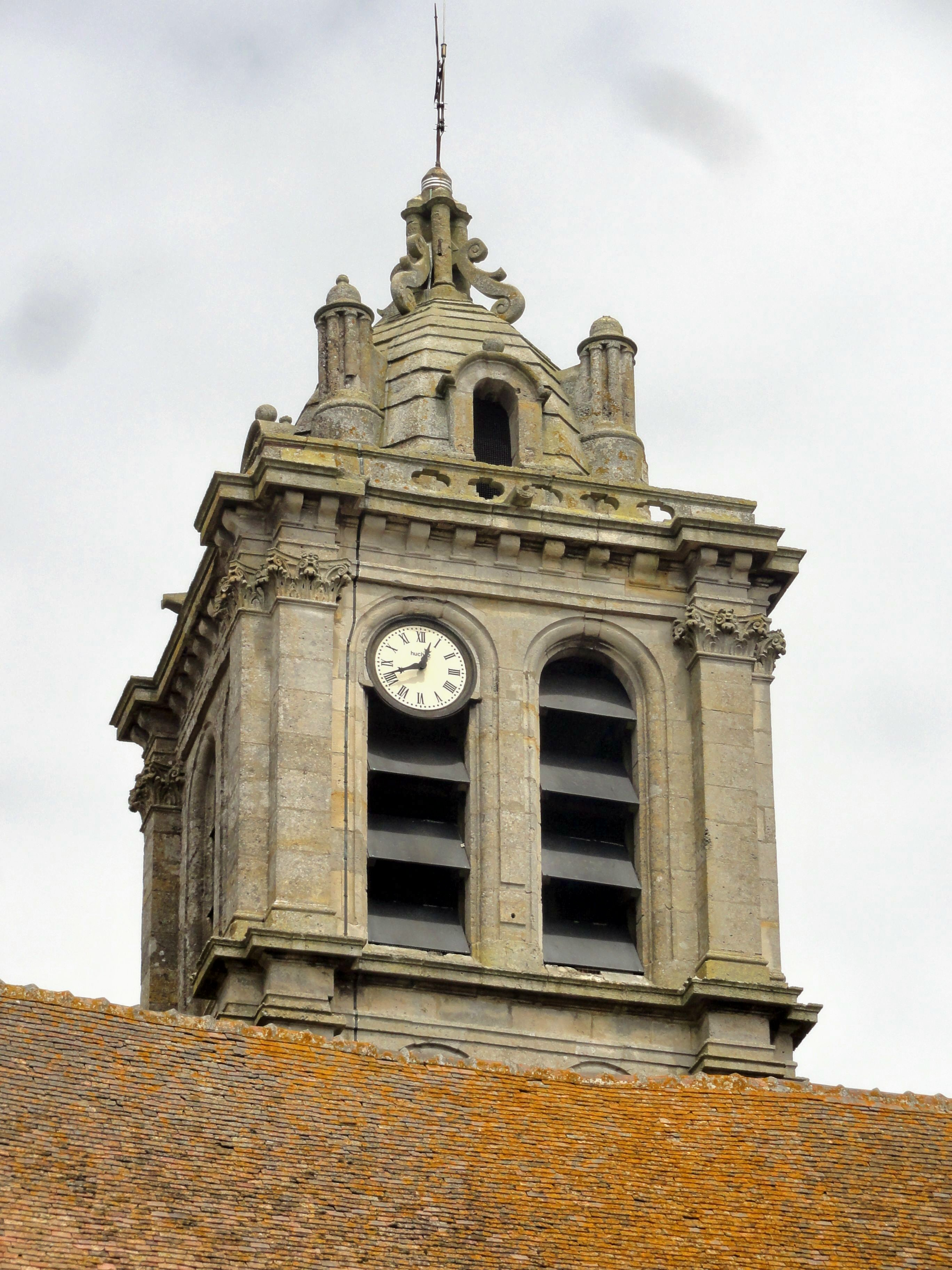 Clocher, étage de beffroi, côté sud.